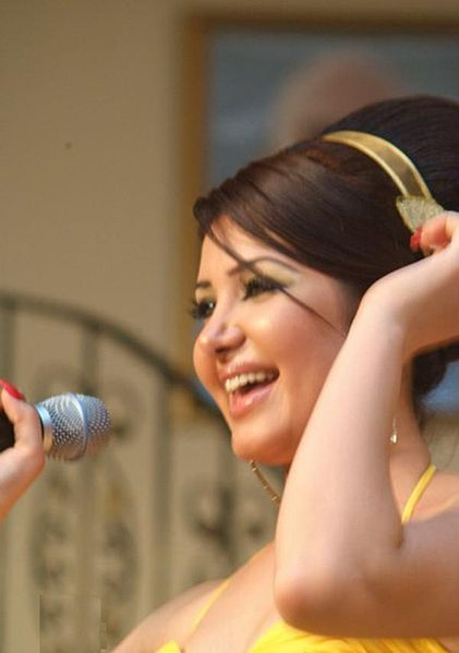 Dalli Hadad bei einem Auftritt in Amman, Jordanien